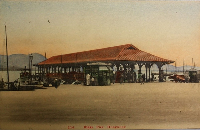 卜公碼頭 Blake's Pier in the 1920s